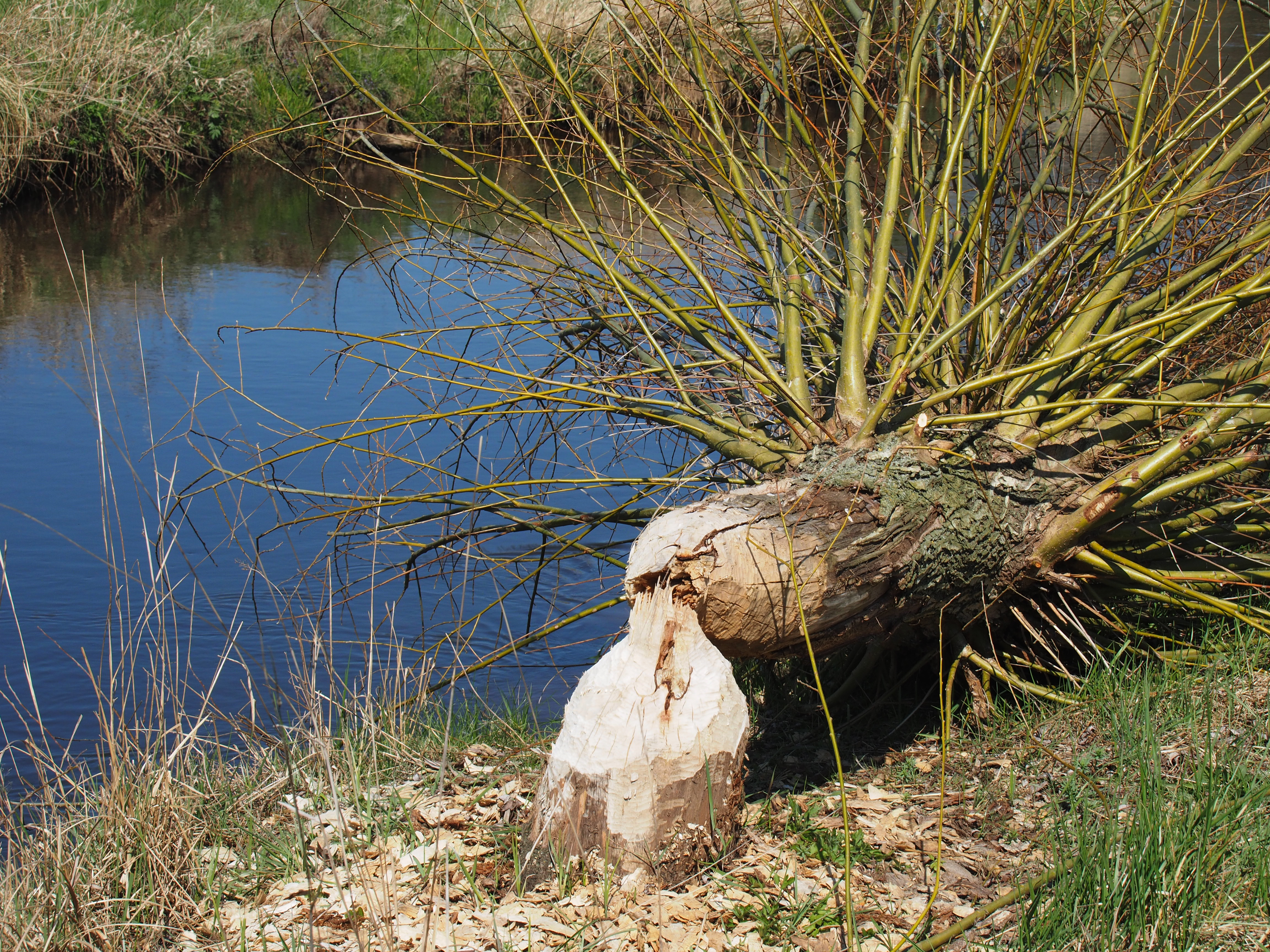 Bieberspuren an einer Weide am Ufer der Örtze